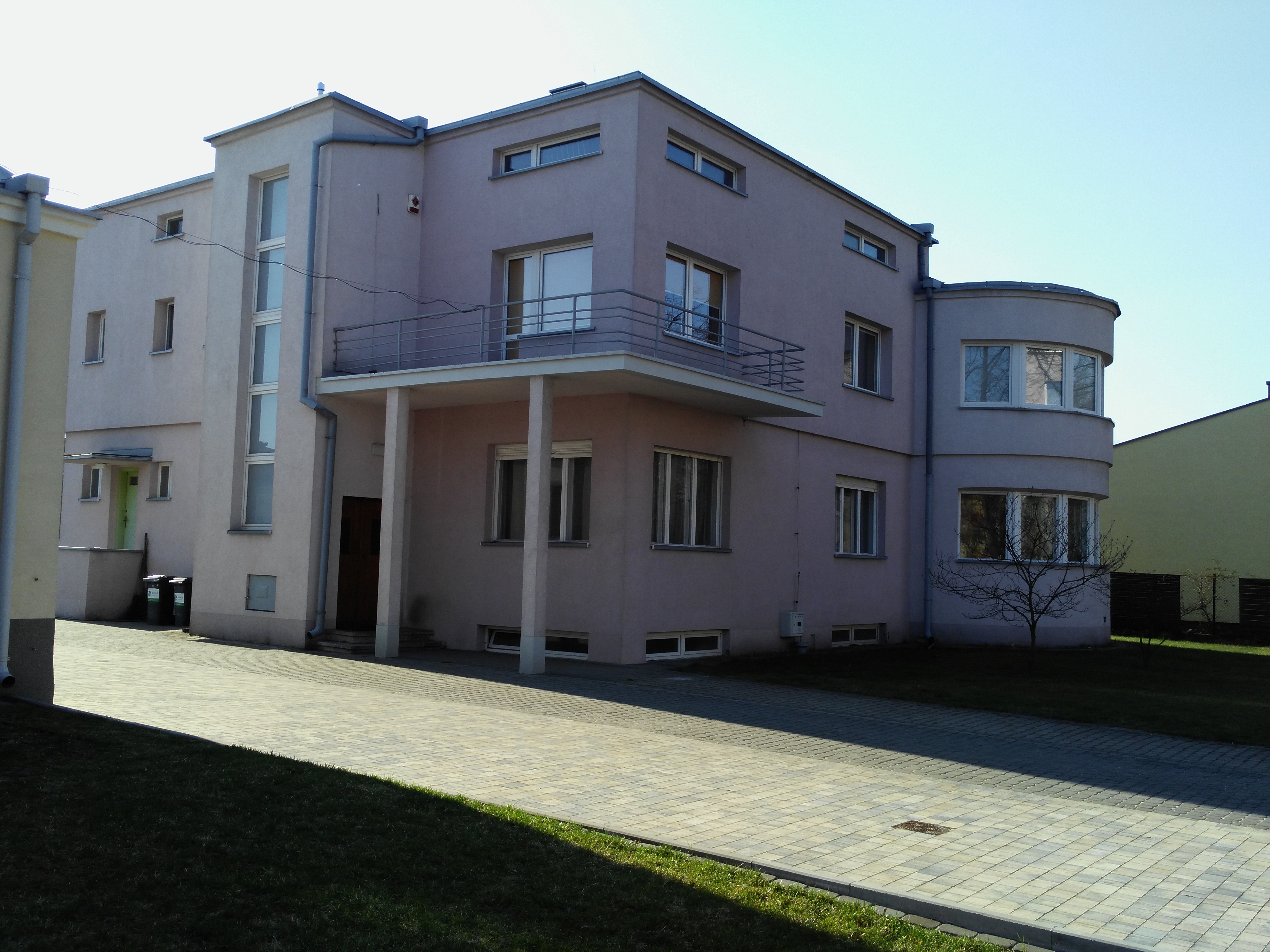 Przedwojenna modernistyczna willa prze św.Antoniego wTomaszowie Mazowieckim